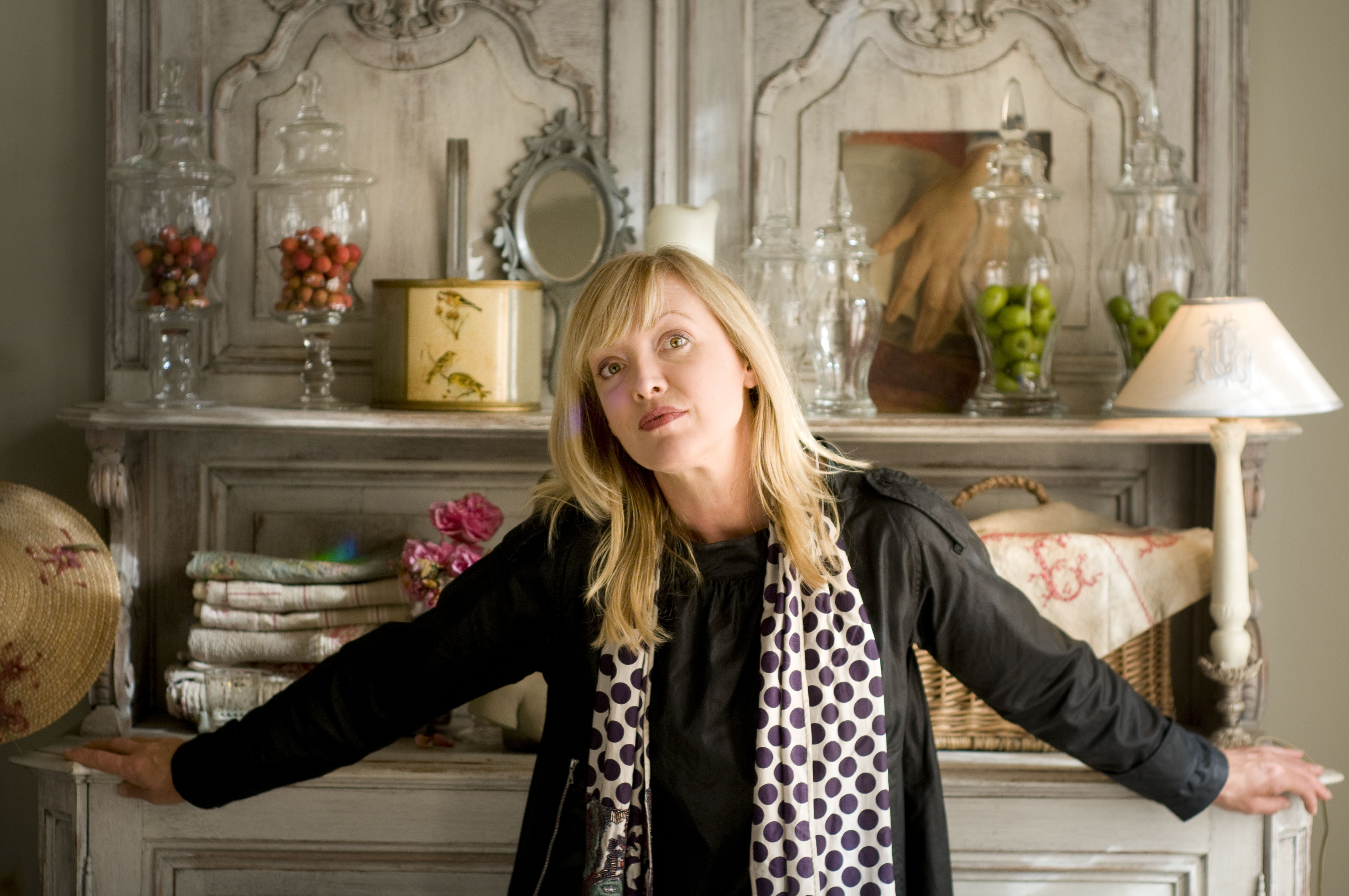 Elsje Helewaut, bij haar thuis in Zarren.